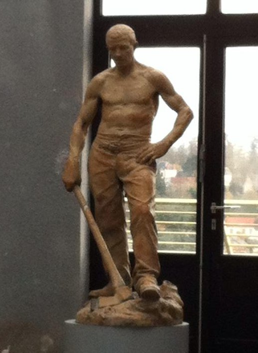 Paul Richer, Le Bûcheron de la forêt de la Londe, 1899, grès cérame, Vierzon, lycée Henri-Brisson.